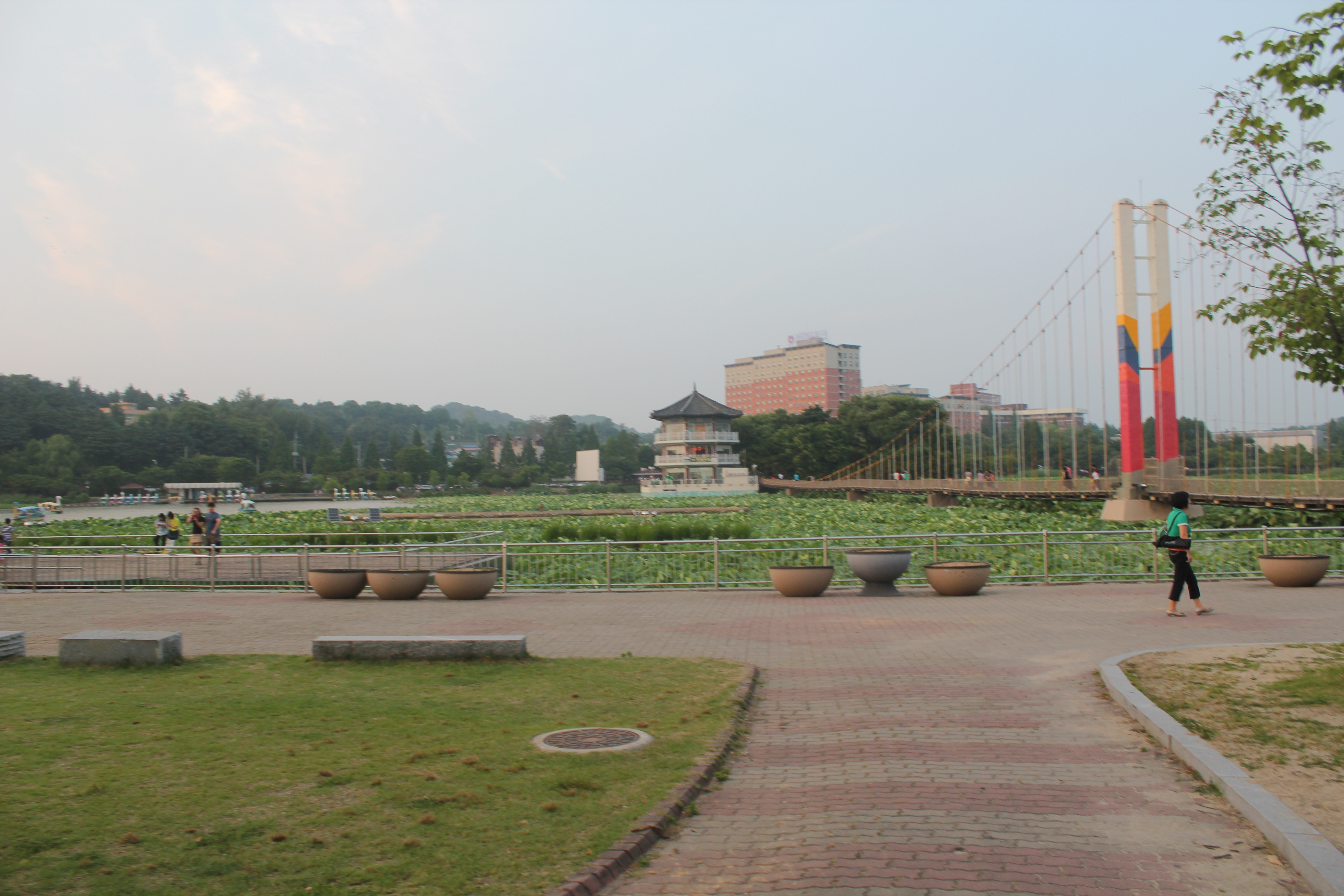 덕진공원 전경